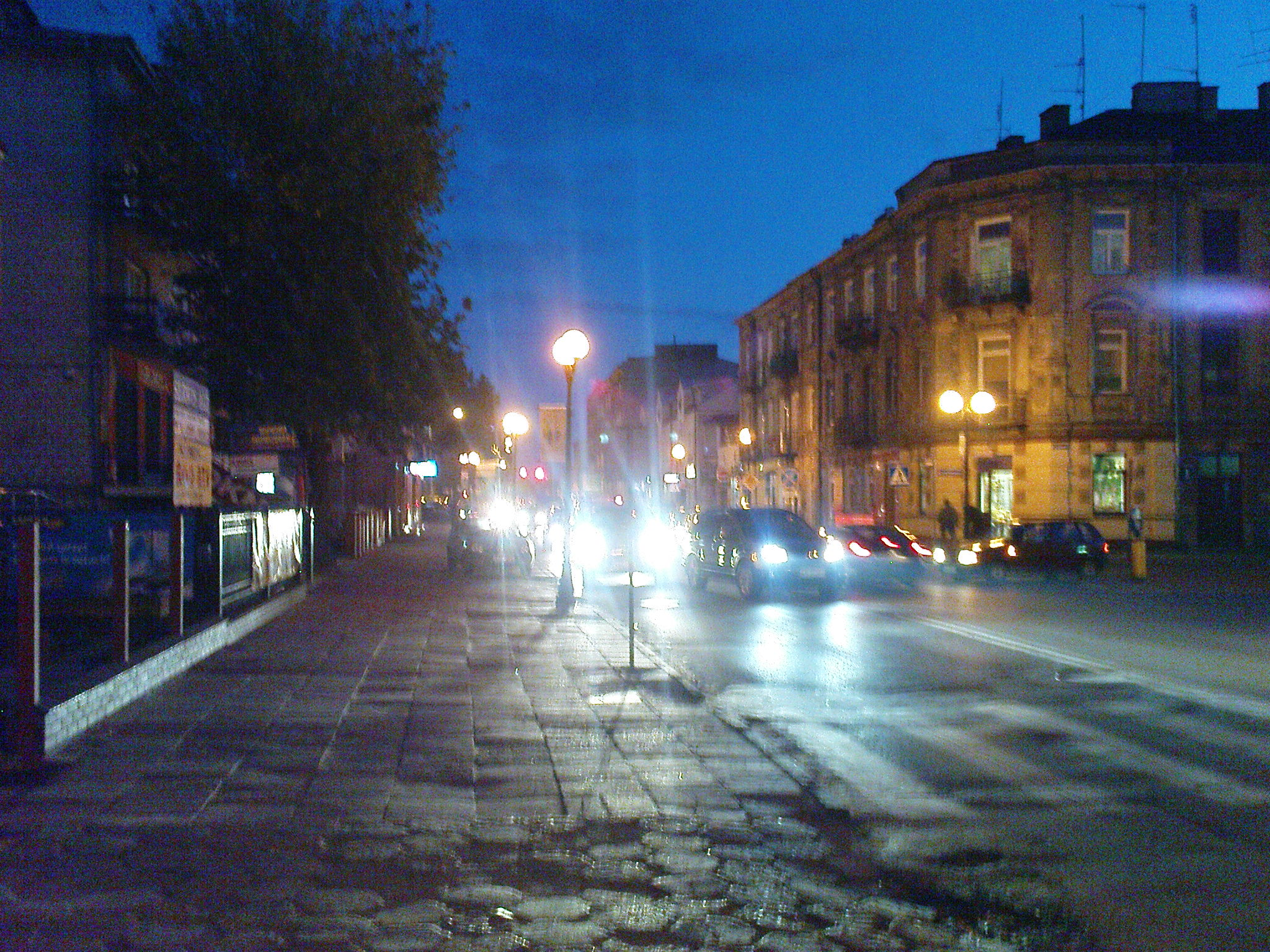 Siedlce - ul. Floriańska